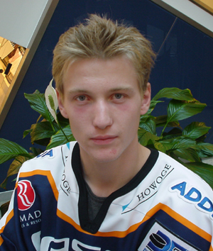 Frank Hördler